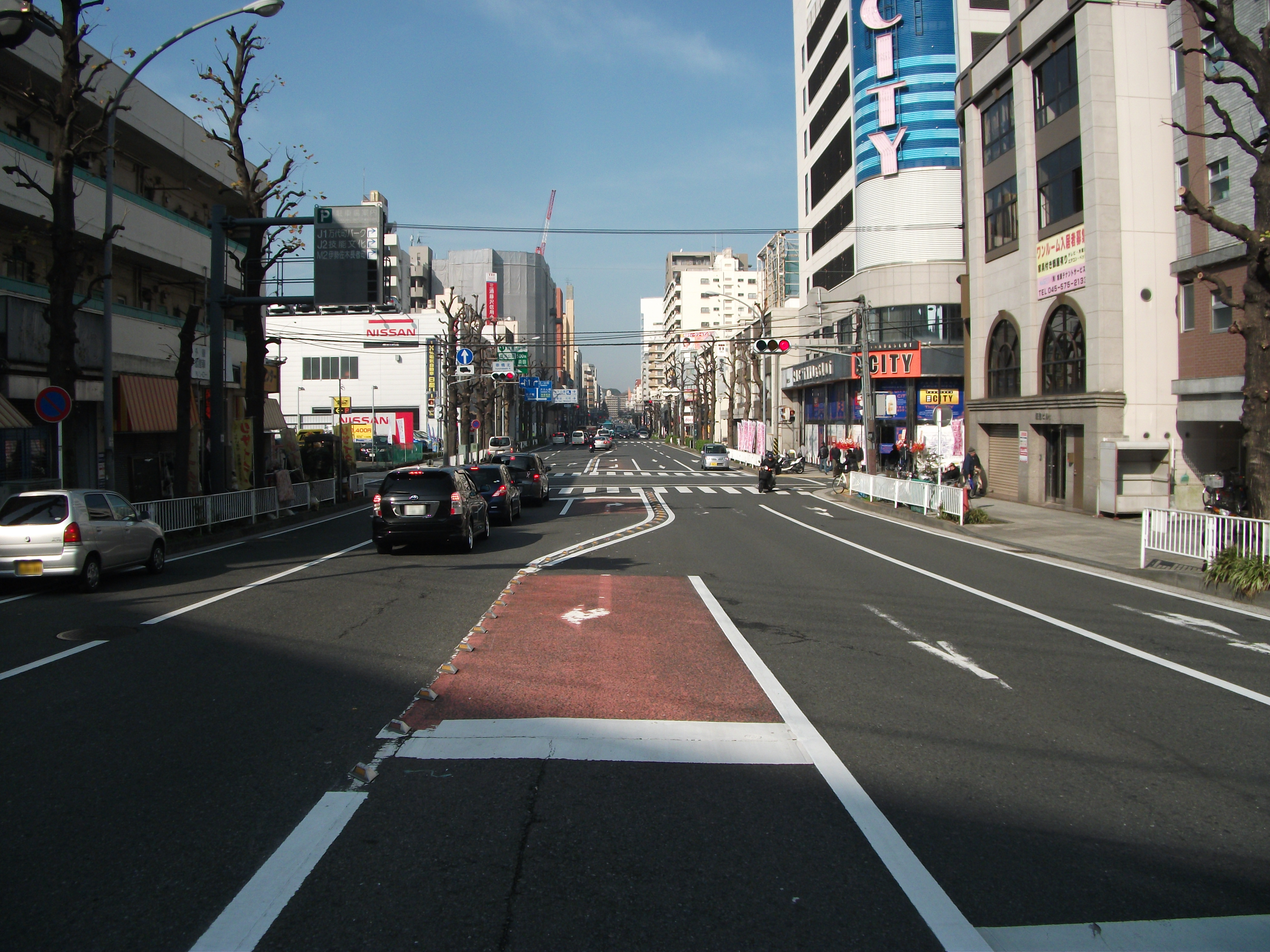 横浜市中区長者町付近の横浜駅根岸道路